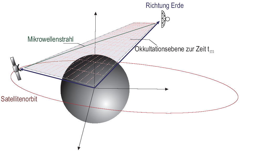 Zur Okkultationsebene